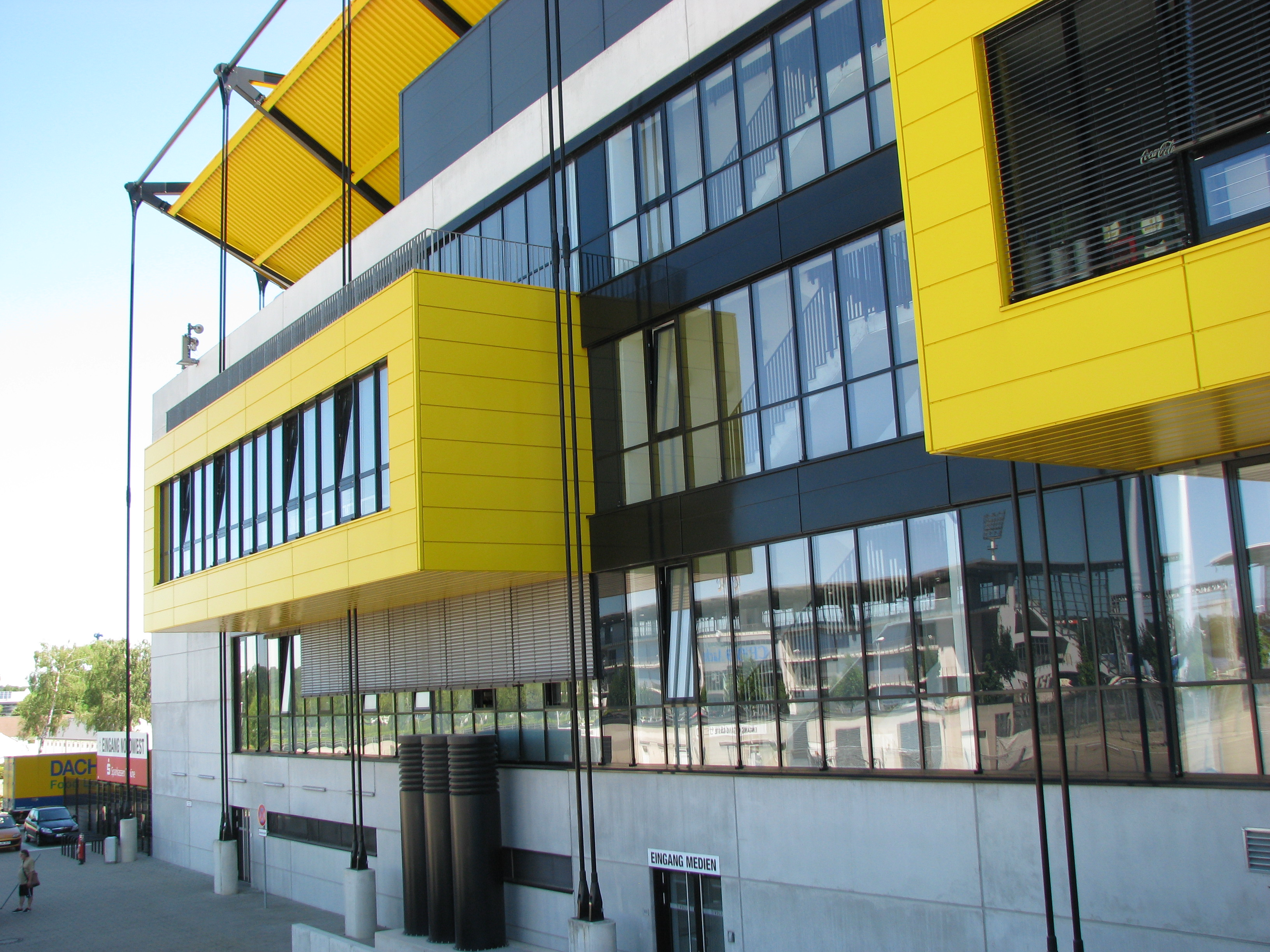 Fassadenelemente am neuen Tivoli in Aachen.